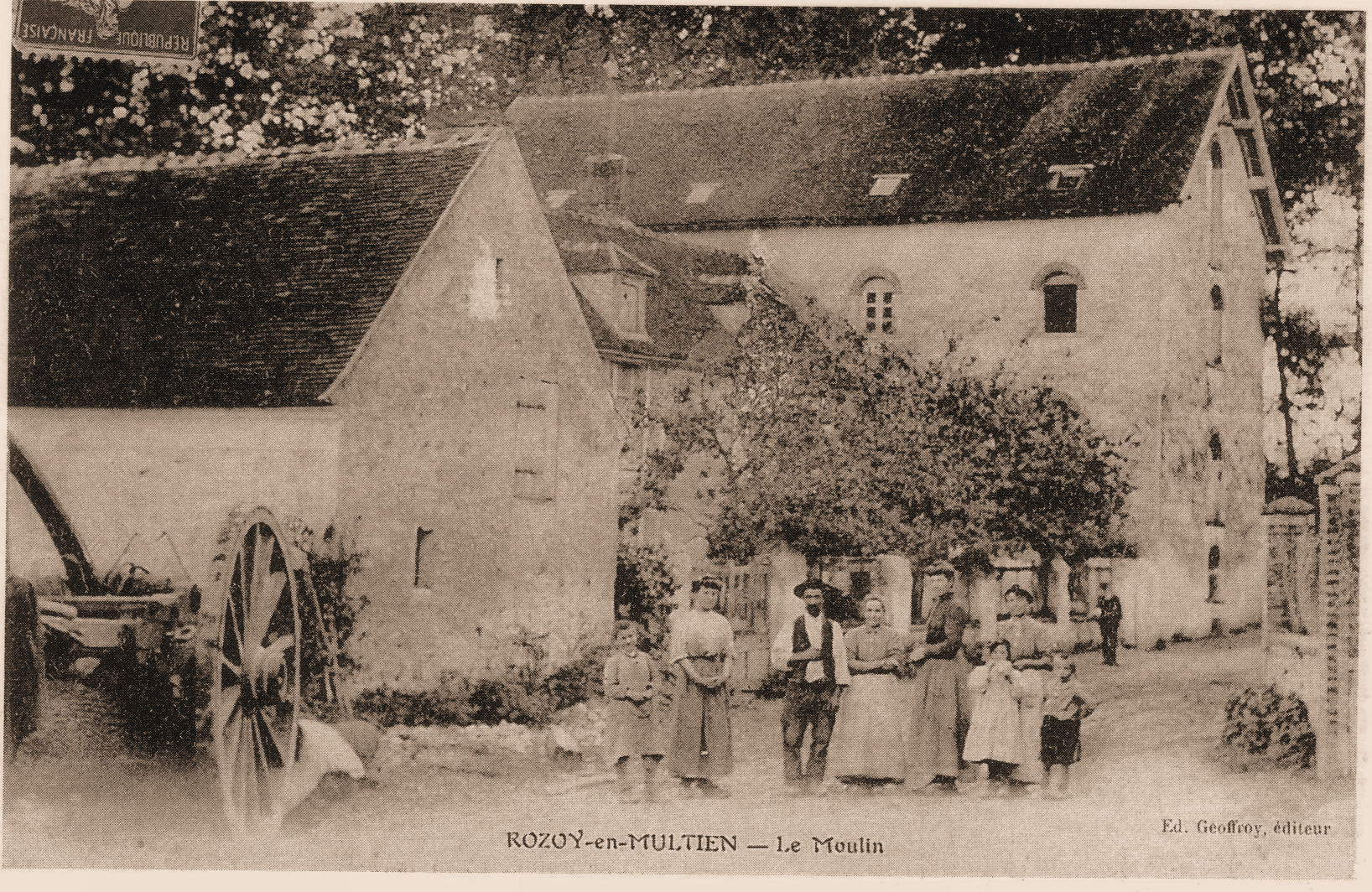 Probablement XVIe siècle, vue aval